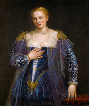 Portrait of a Woman, Called La Bella Nani, Musée du Louvre, Paris.